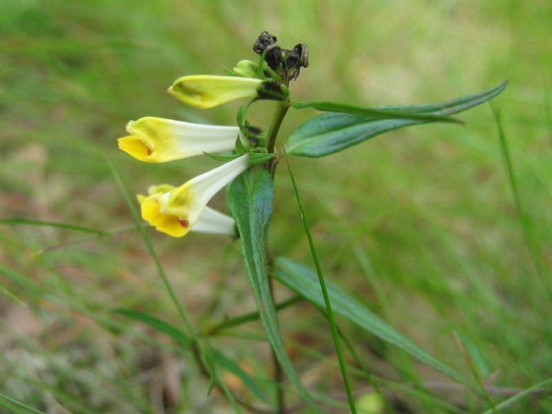 Wiesen-Wachtelweizen Melampyrum pratense, Müritz-Gebiet